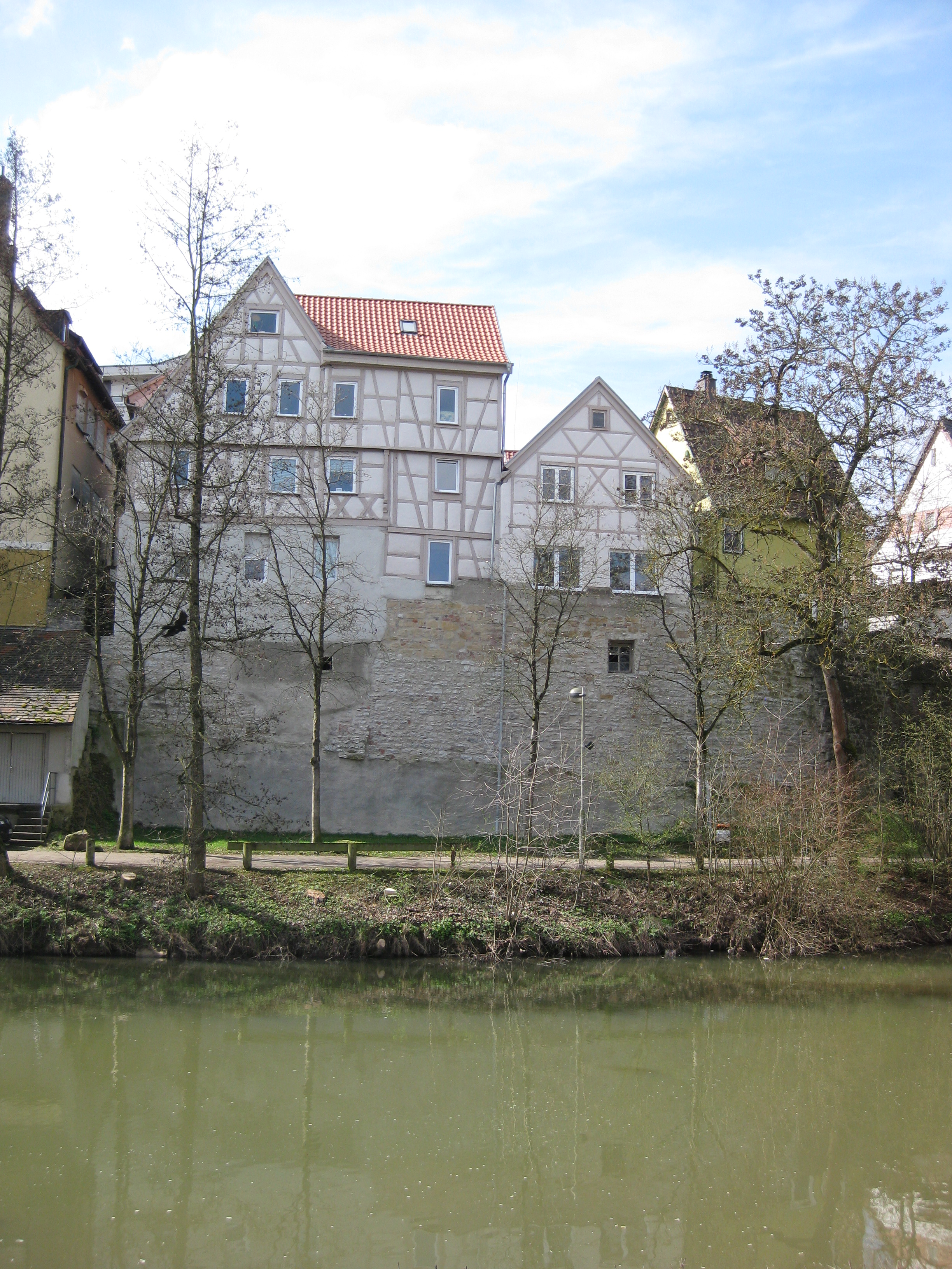 Backnang Flußansicht mit Stadtmauer und Fachwerkhaus